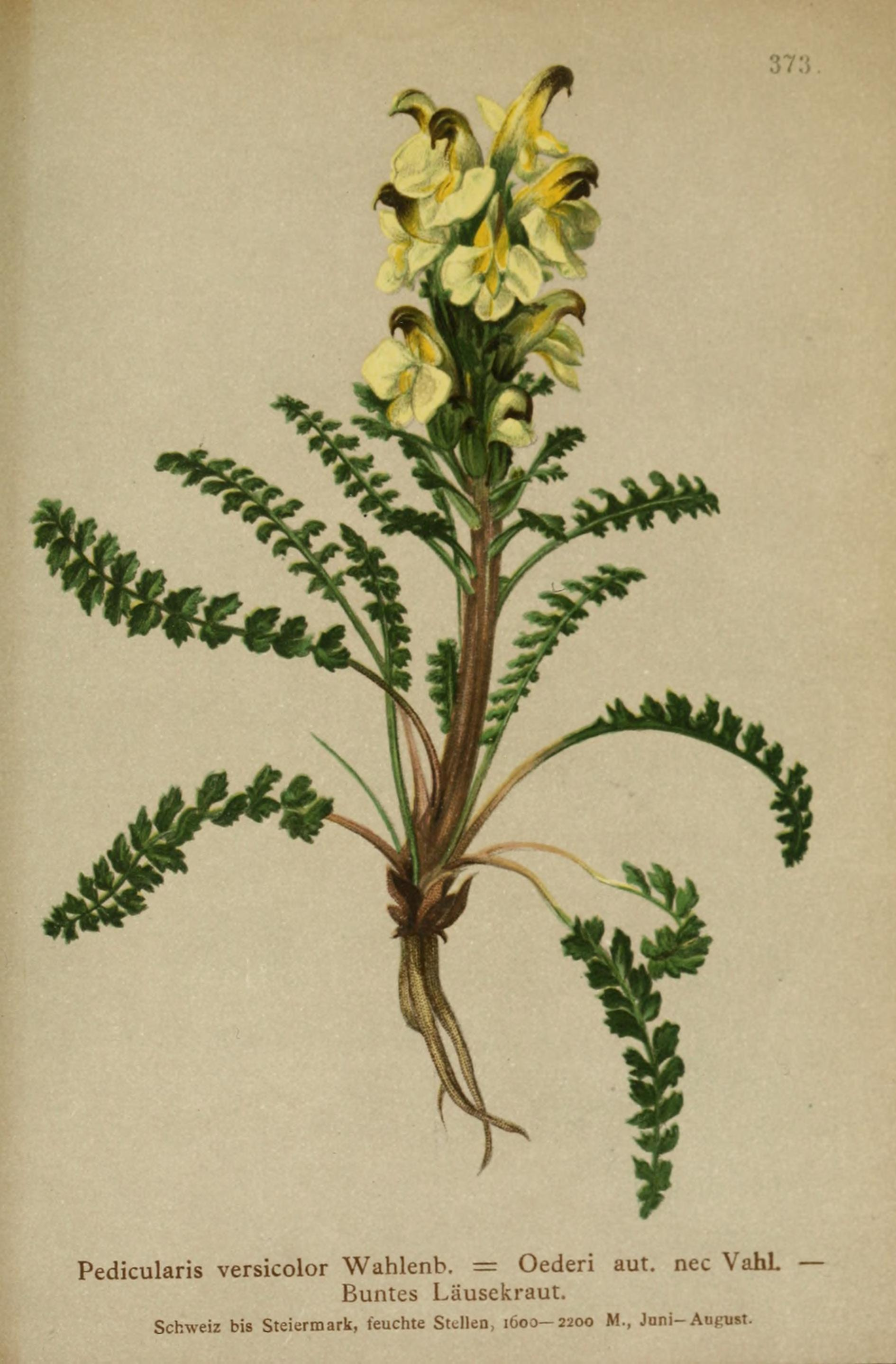 Atlas der Alpenflora / herausgegeben vom Deutschen und Oesterreichischen Alpenverein ; nach der Natur gemalt von Anton Hartinger ; mit Text von K.W. v. Dalla Torre.